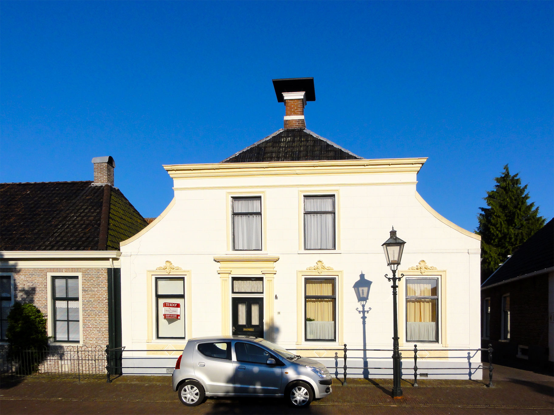 Voorstraat 19 Nieuweschans